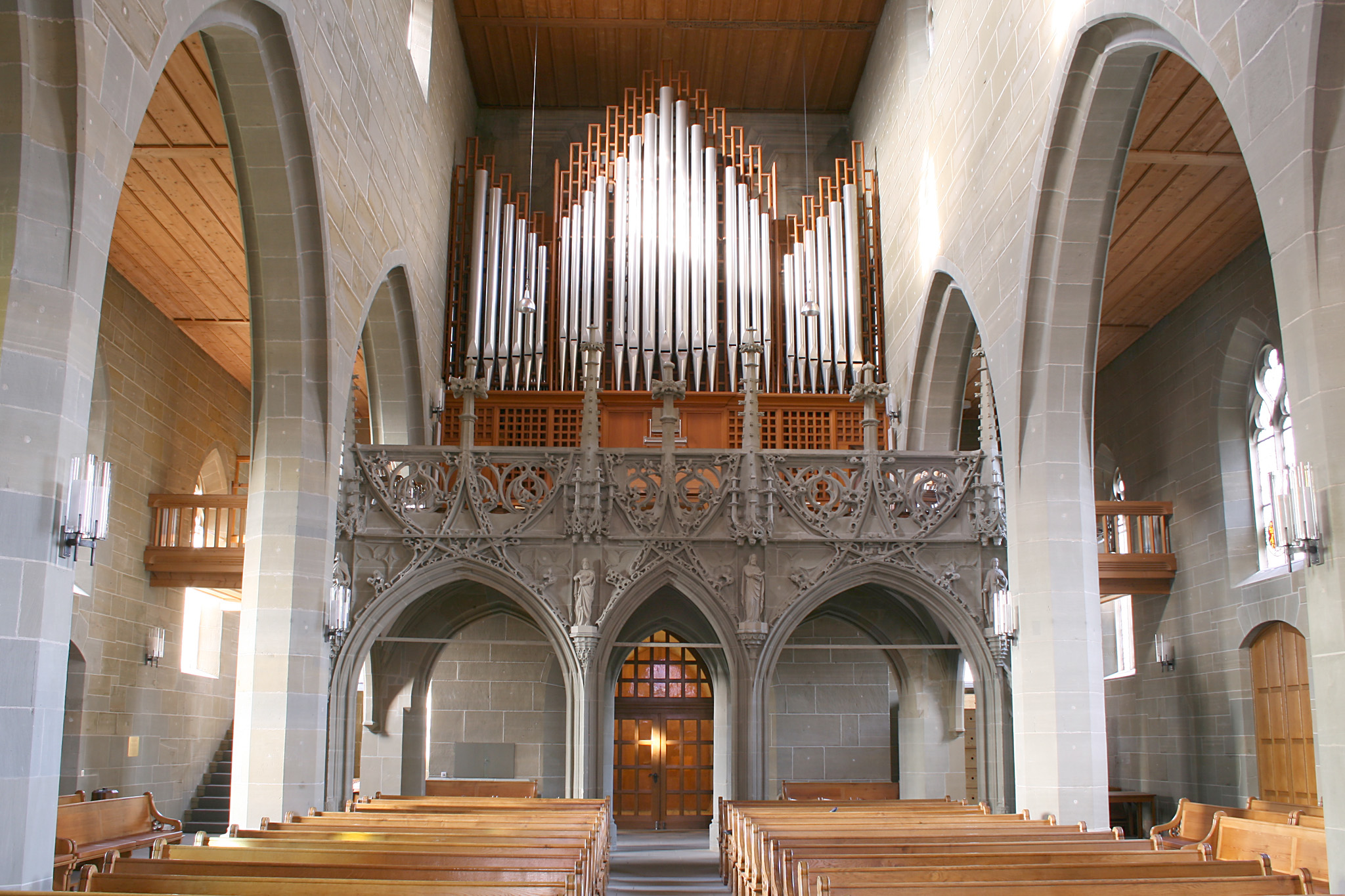 Lettner und Orgel in der Stadtkirche Burgdorf, Schweiz